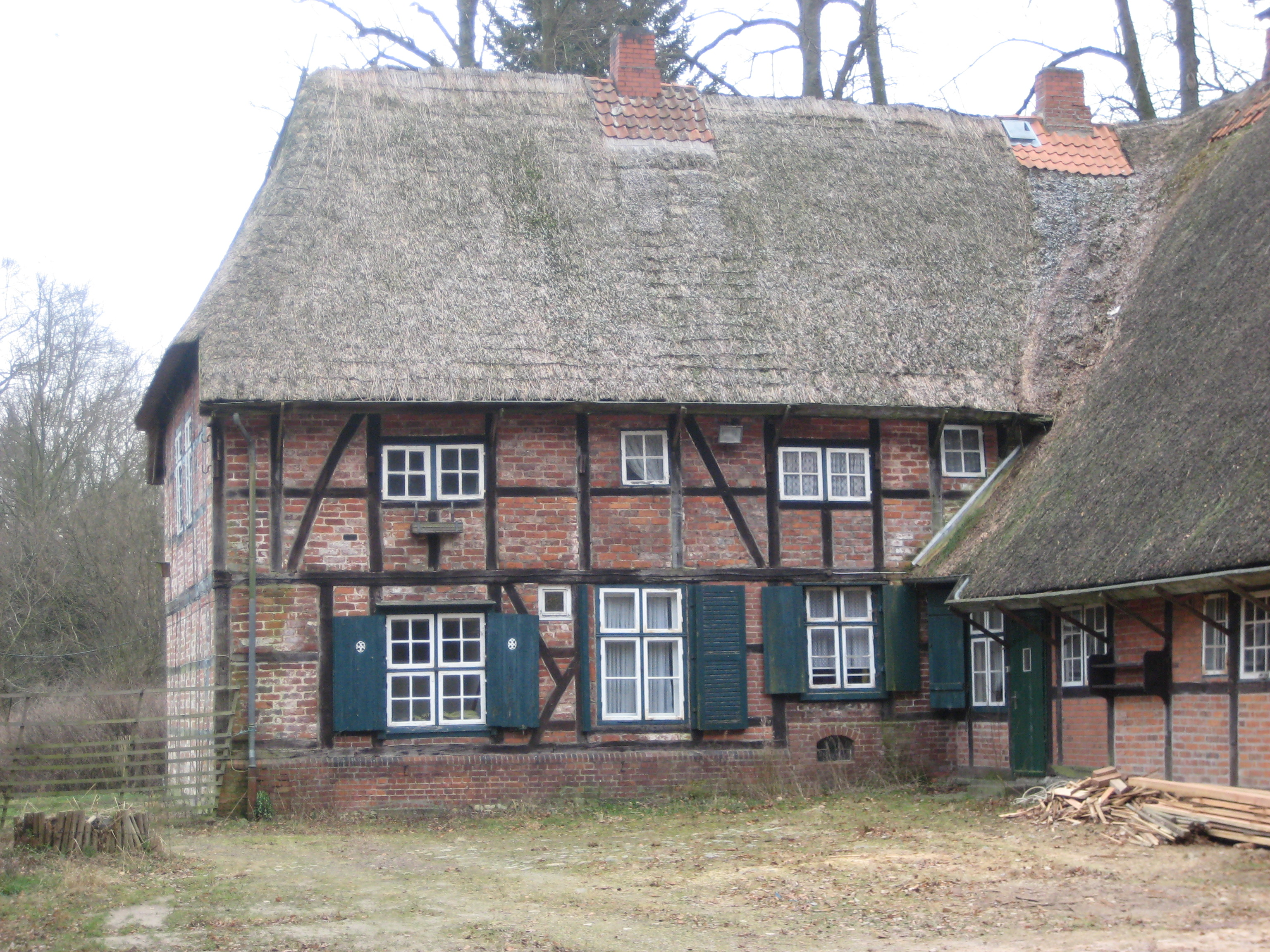 Forsthaus Waldhusen, Forsthaus Waldhusen aus dem Jahr 1765, hier: Anbau von 1807